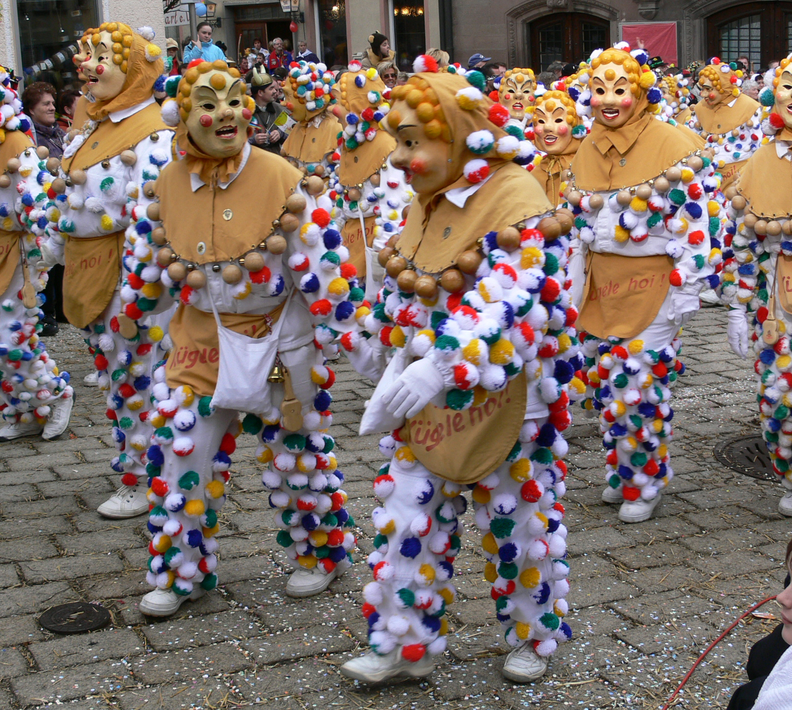 Narrenzunft Spritzenmuck Ehingen, Figur: Kügele Veranstaltung: Narrensprung beim Narrentreffen Meßkirch 2006